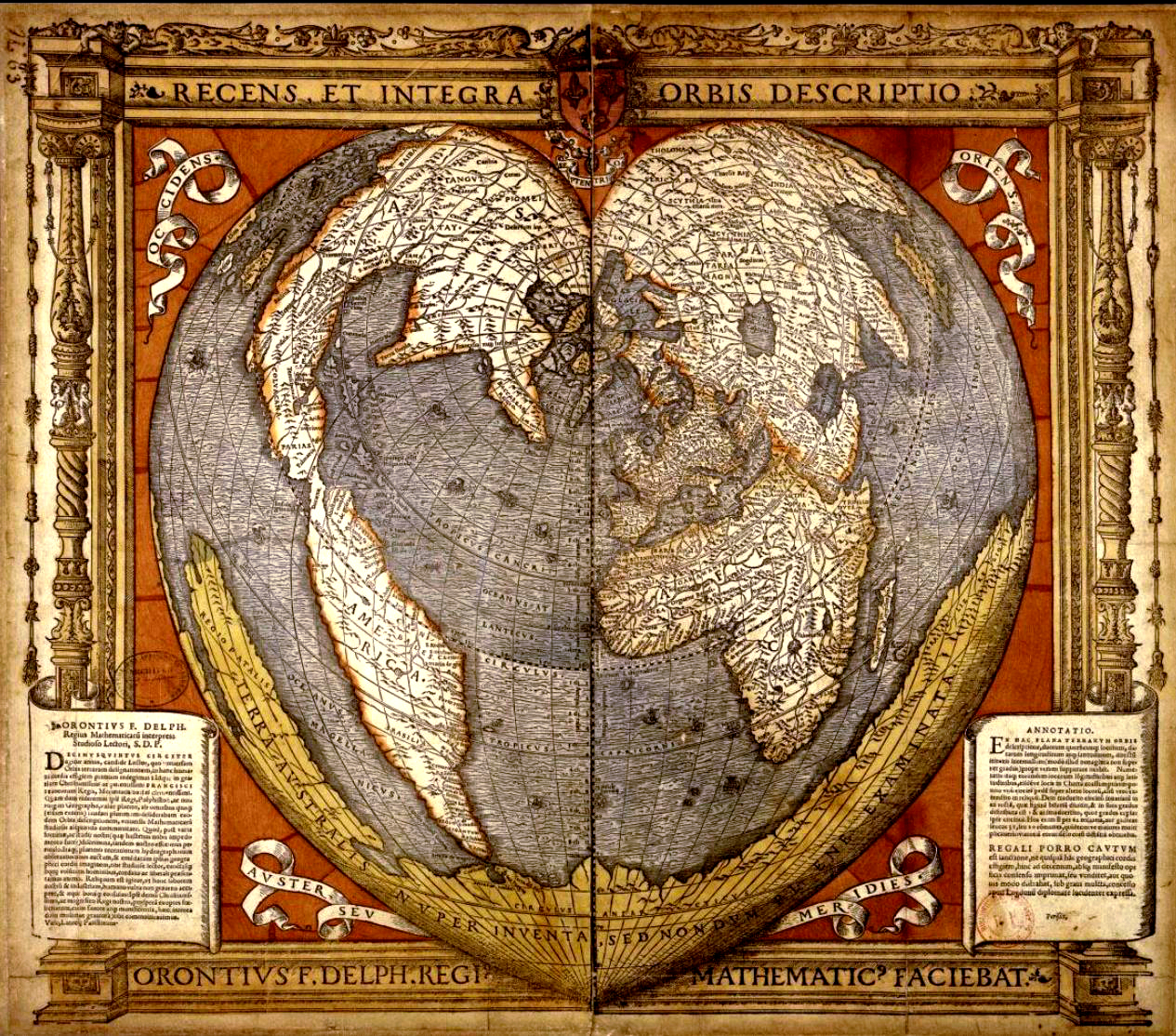 Oronce Fine, Mappemonde en forme de cœur montrant la Terre australe. Recens et integra orbis descriptio, Paris, 1536. Carte gravée sur bois et aquarellée (51 × 57 cm (20 × 22.4 ″) en 2 f. assemblés). BNF, Cartes et Plans, Rés. Ge DD 2987 (63).